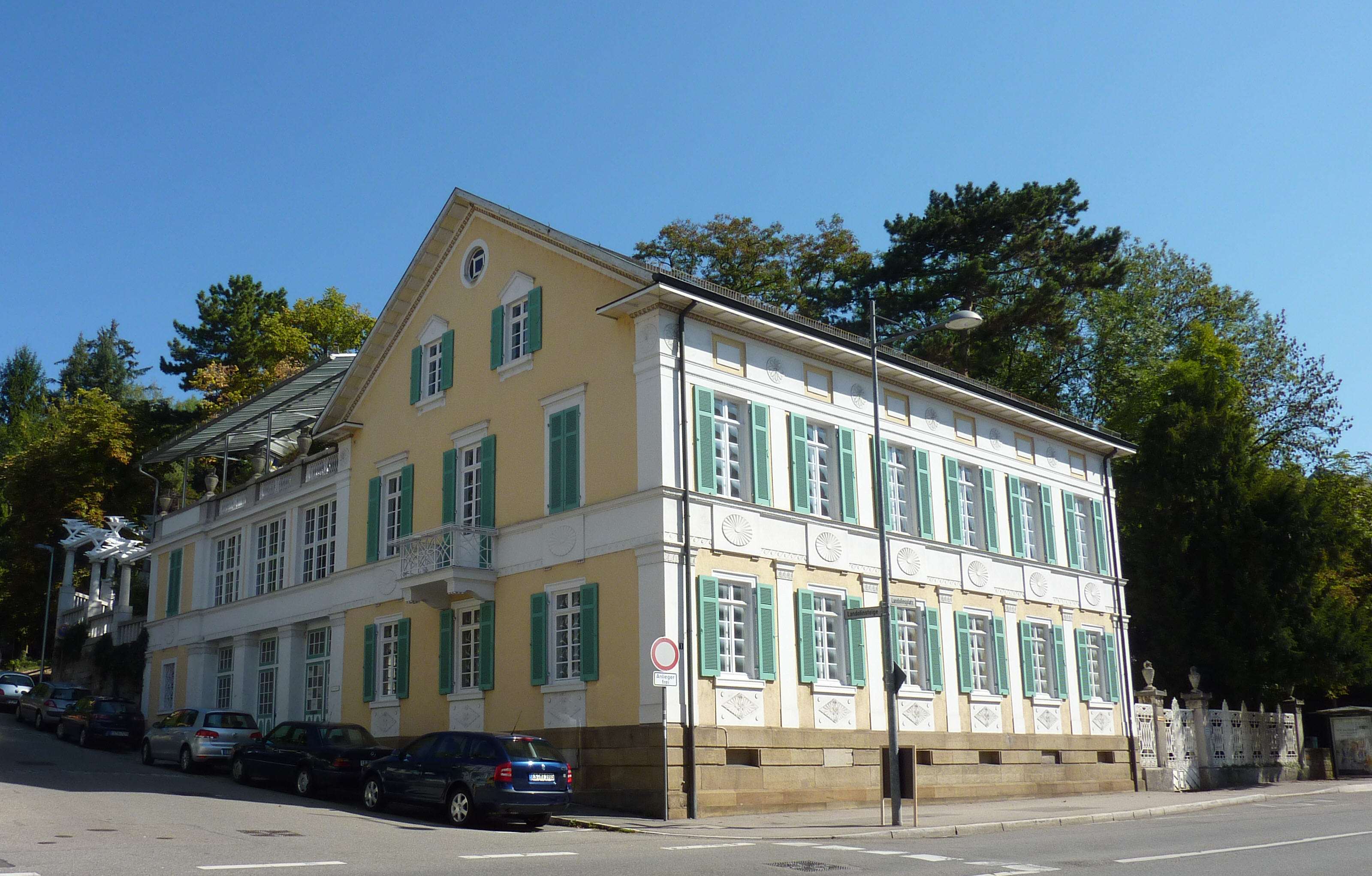 Esslingen. Landolinshof Augustinerstraße Ecke Landolinsteige.